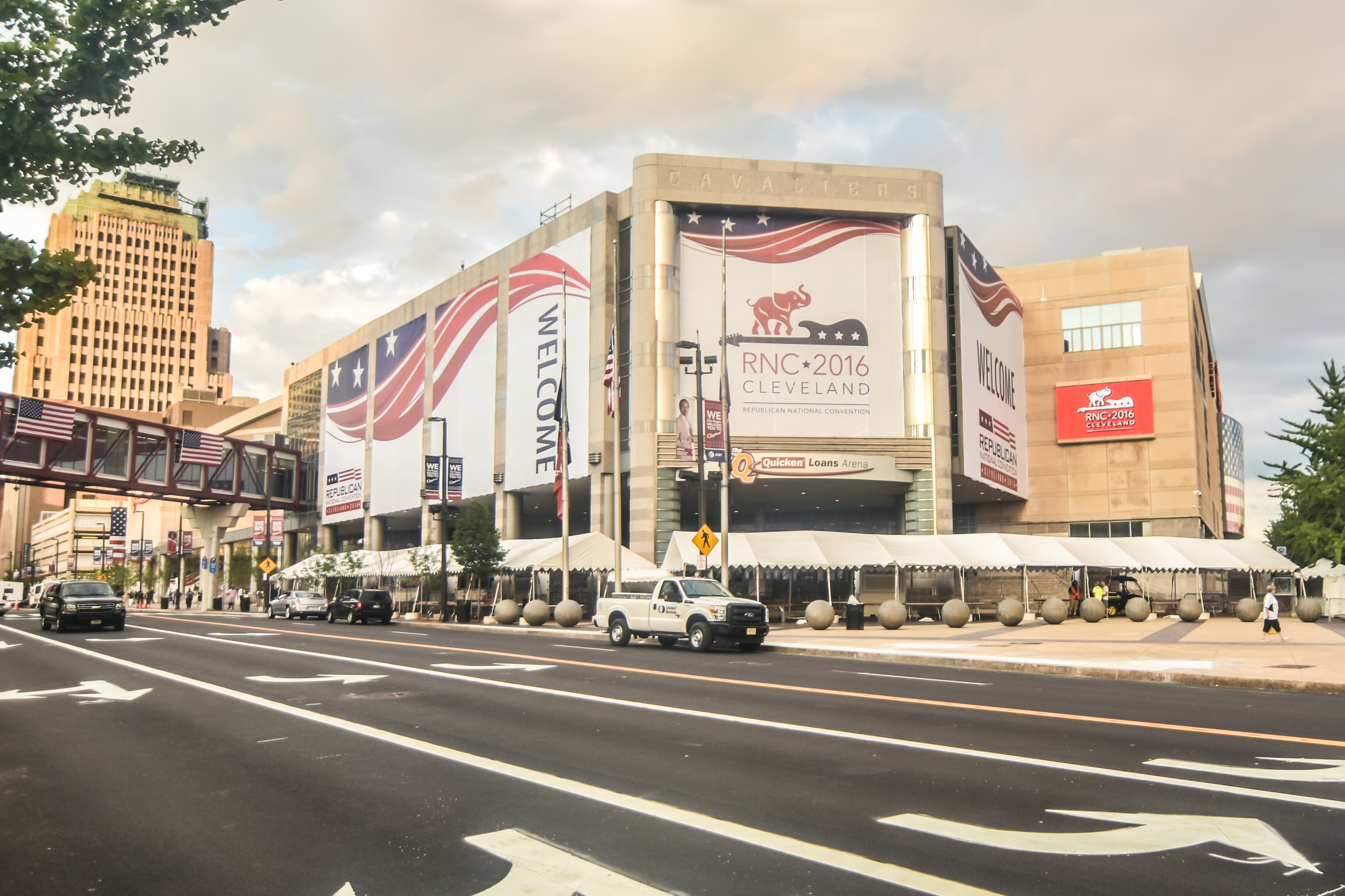 Quicken Loans Arena